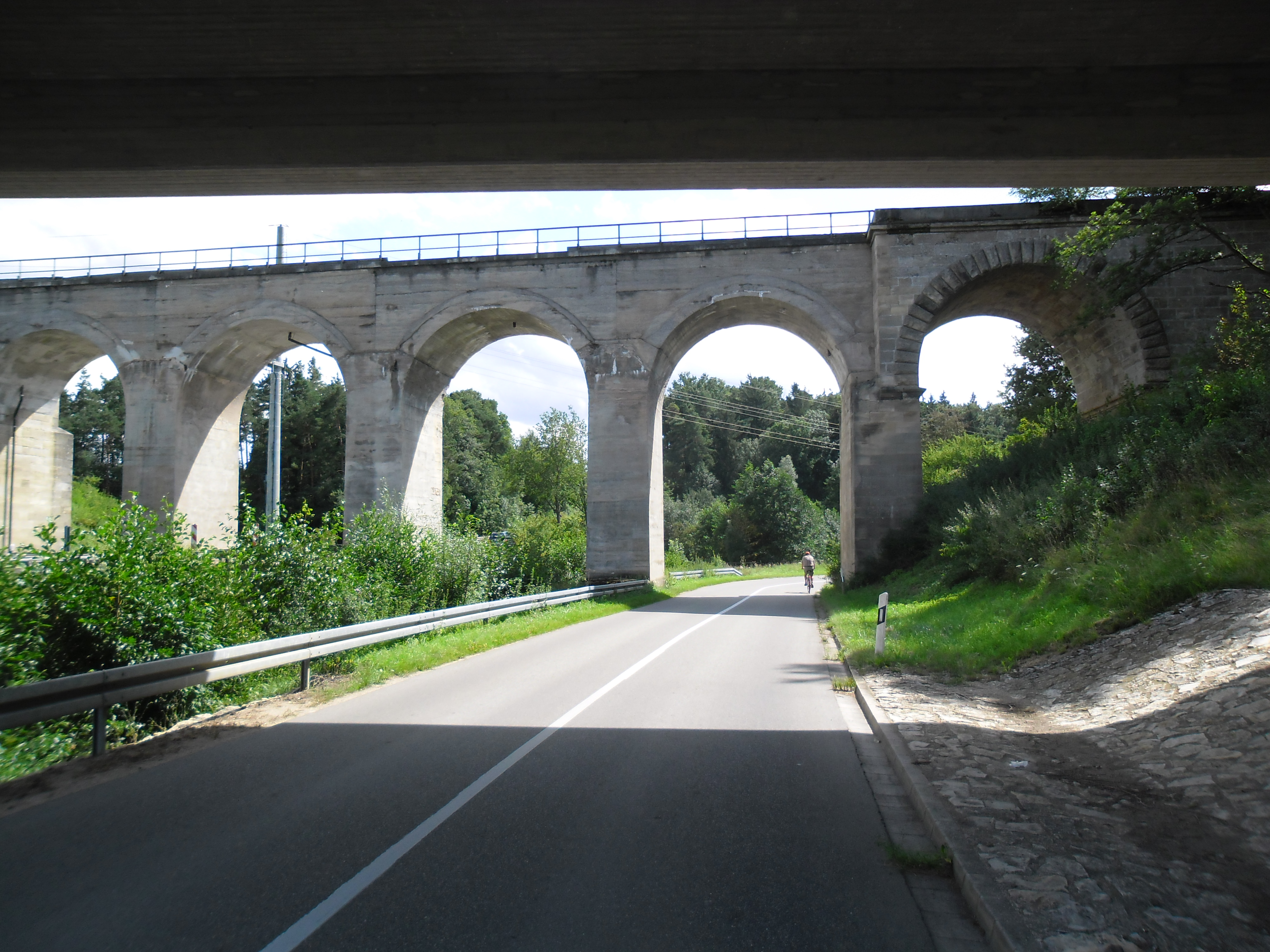 Auto- und Eisenbahnbrücke über die B466 zwischen Ober- und Unterwurmbach